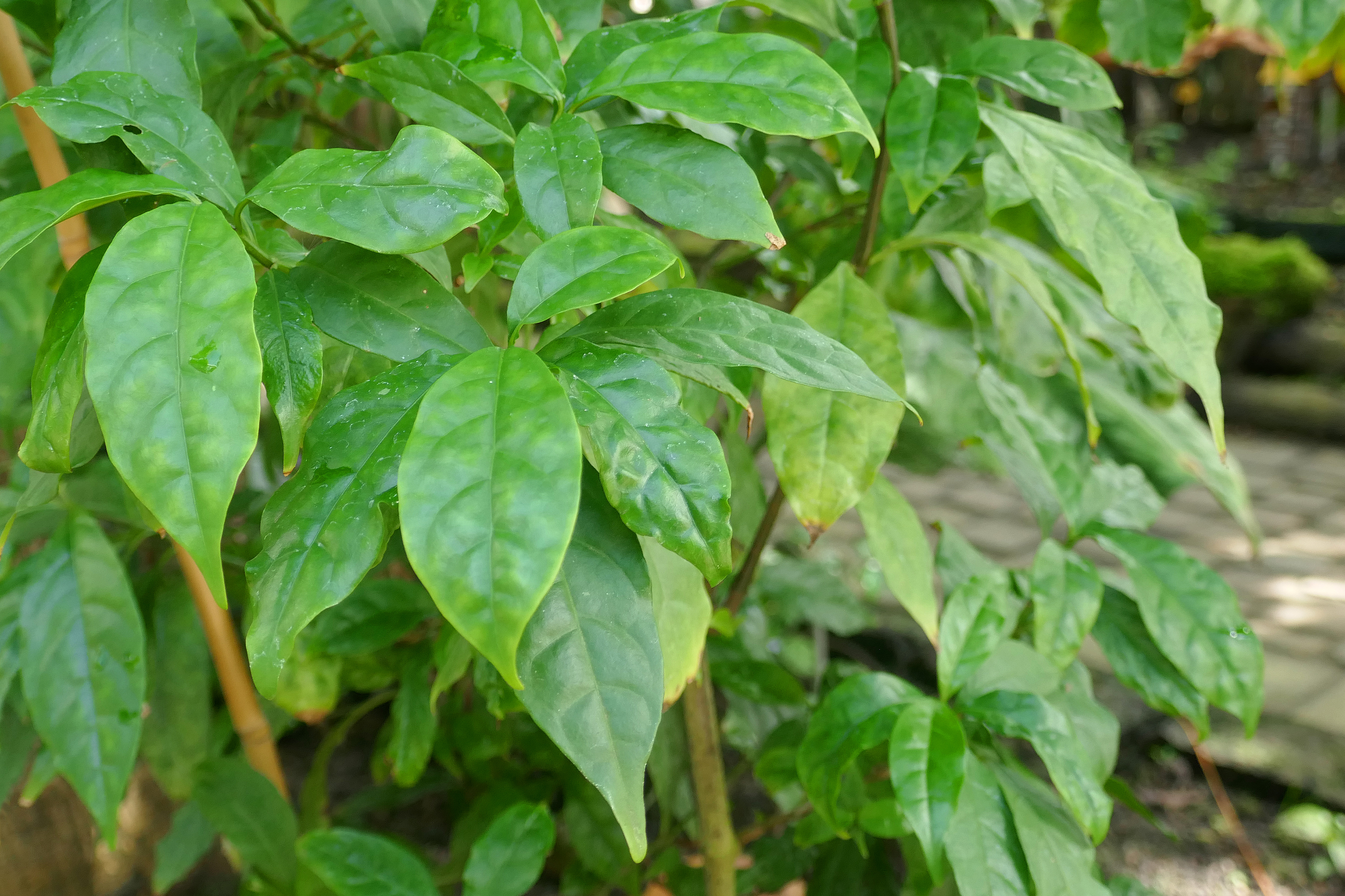 Whitfieldia elongata (P. Beauv.) De Wild. & T. Durand nl : slanke whitfieldia fr : whitfieldia allongé bomitaba (Congo Brazz.) : mokoto bongo mashi (D.R. Congo) : mushegemandjoka bemba (Congo Brazz.) : mbôsi Afrique tropicale. Jardin botanique Meise (Belgique).